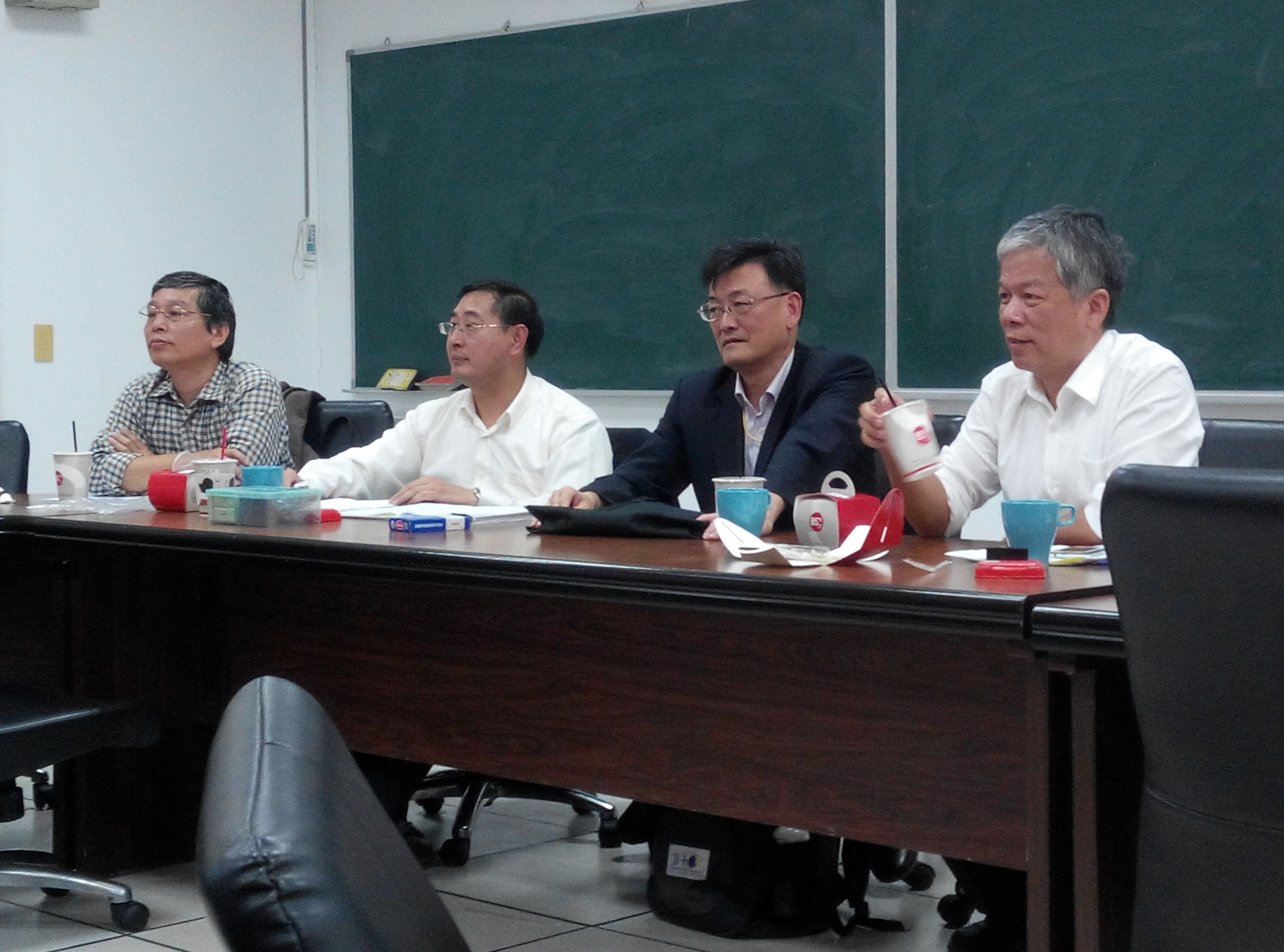 中華民國物理教育學會四任理事長應邀參加國立彰化師範大學格致館物理系會議室「2017動手做物理研討會」籌備會議。左起：林泰生、洪偉清、賈至達、洪連輝。